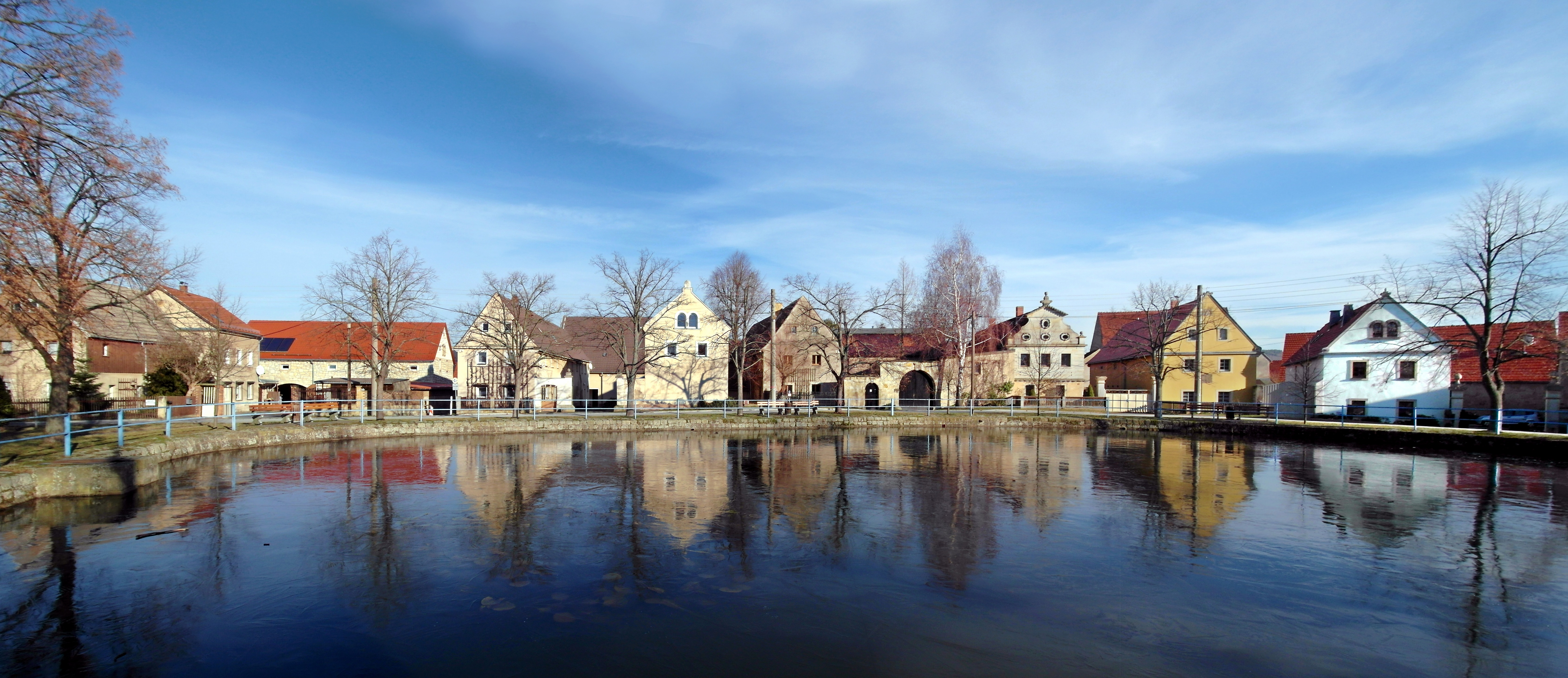 19.01.2019 01796 Goes (Dohma): Dorfanger Goes in Form eines Rundlings mit dem Dorfteich (GMP: 50.928305,13.945817). Blick nach Nordosten zu den historischen Giebelhäusern der Gehöfte an der Dorfstraße. [SAM8963+66+72.JPG]20190119200MDR.JPG(c)Blobelt